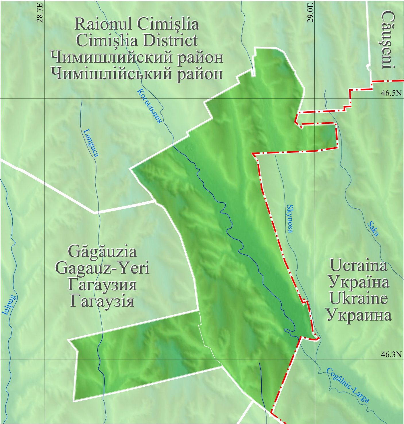 Harta de localizare Moldova Basarabeasca.